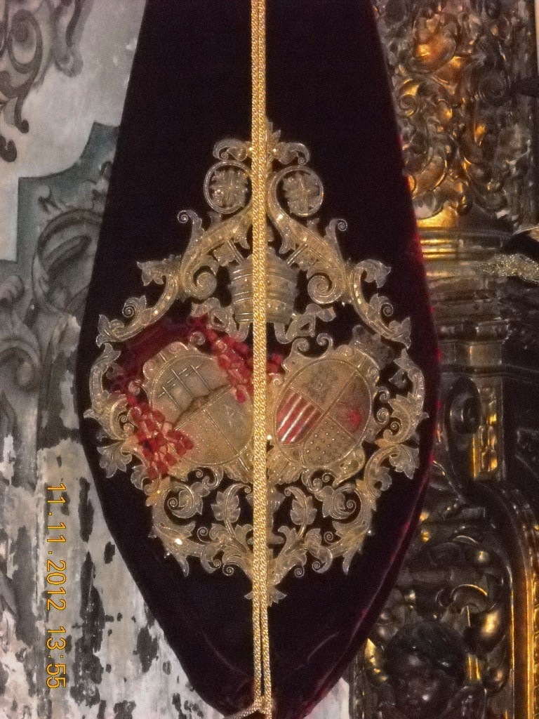 Escudo de que aparece en el bacalao de la Hermandad